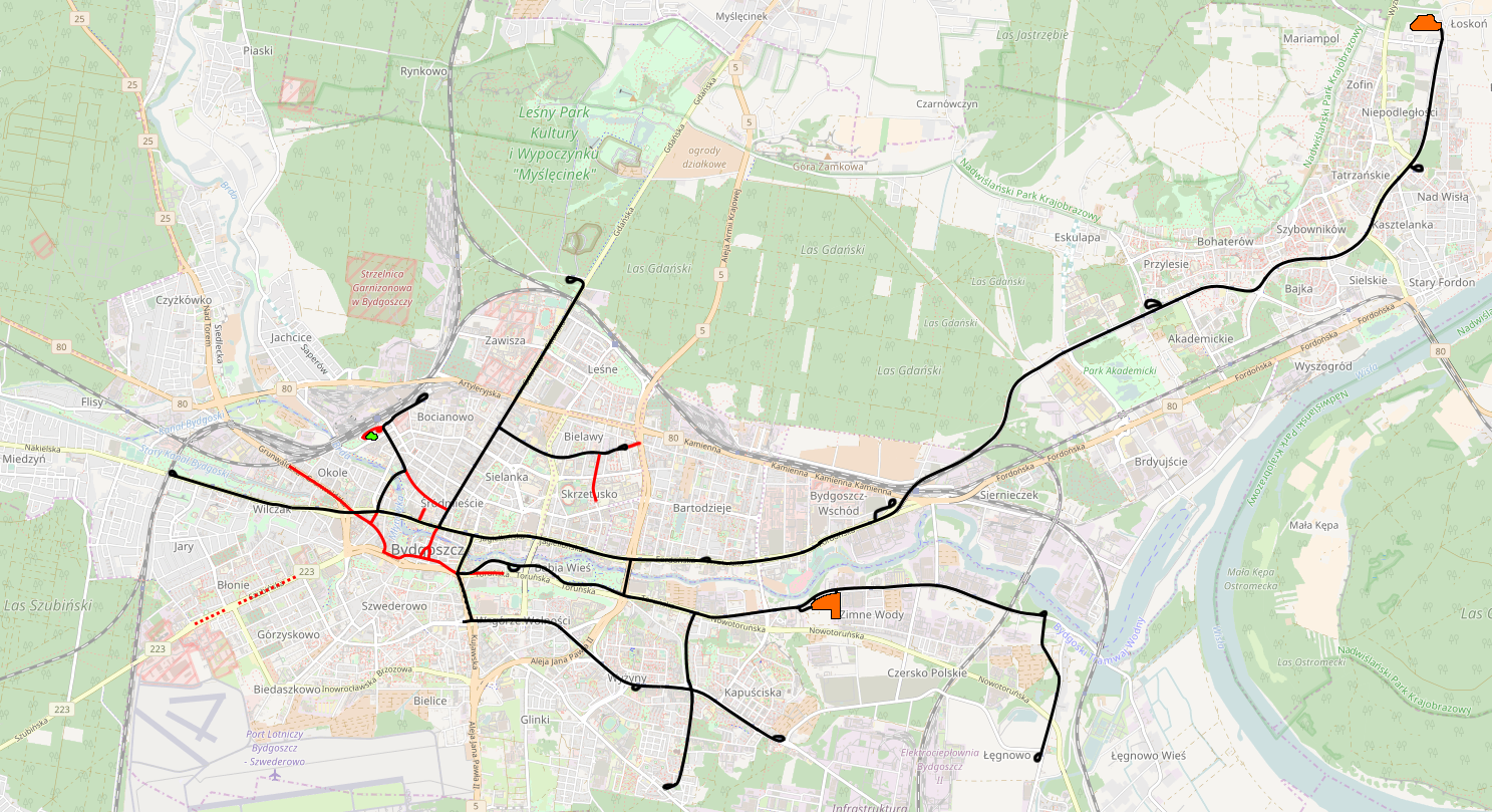 Sieć tramwajowa w Bydgoszczy, linie istniejące i zlikwidowane.